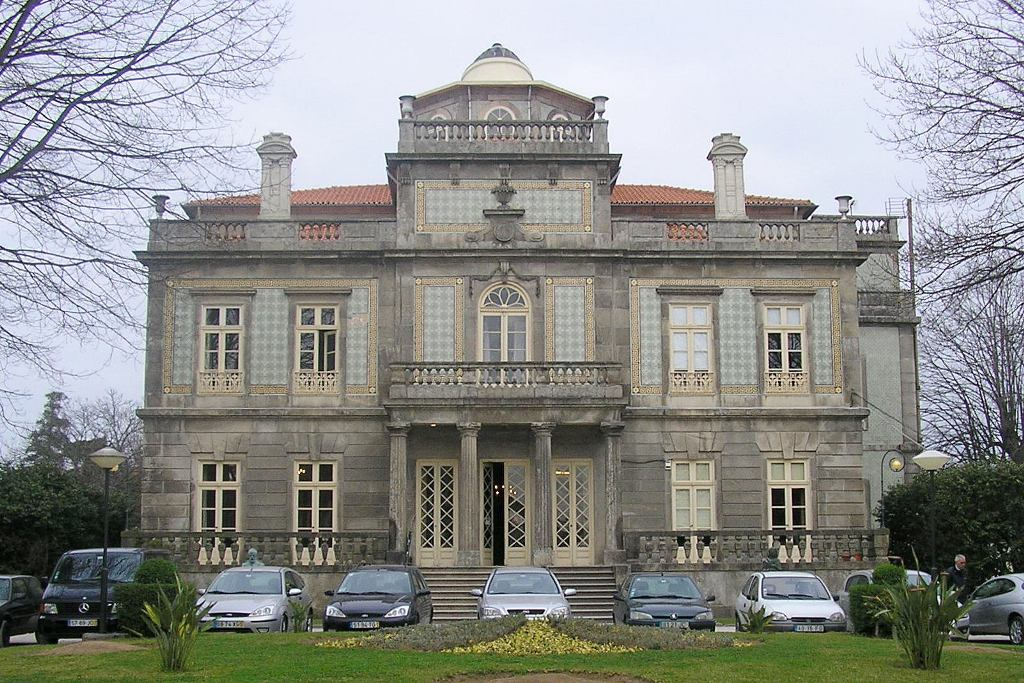 "Pinto Leite" house / Casa e Jardim do Campo Pequeno, na Rua da Maternidade nº 3 a 13, na freguesia de Massarelos, Porto, Portugal Em junho de 2015, a Câmara do Porto voltou a colocar o Palacete Pinto Leite no mercado. O imóvel de interesse patrimonial, adquirido pelo Município em 1996 e que está devoluto, vale agora 1,55 milhões de euros. O edifício, que acolheu o Conservatório de Música do Porto até 2008 fez parte da lista de imóveis municipais para alienar em 2014 avaliado em 2,58 milhões de euros. A Autarquia pretende a venda por leilão do Palacete, classificado como "imóvel com interesse patrimonial". Os jardins também estão classificados como "área verde privada a salvaguardar". A proposta de alienação pelo valor base de licitação de 1,55 milhões de euros. Quem adquirir o palacete terá de cumprir uma condição: o edifício terá de ser afeto "a fins de âmbito cultural e artístico", não podendo ser dada outra vocação. A obrigação, imposto pelo Município, sustenta-se na utilização histórica do espaço e nas características arquitetónicas.